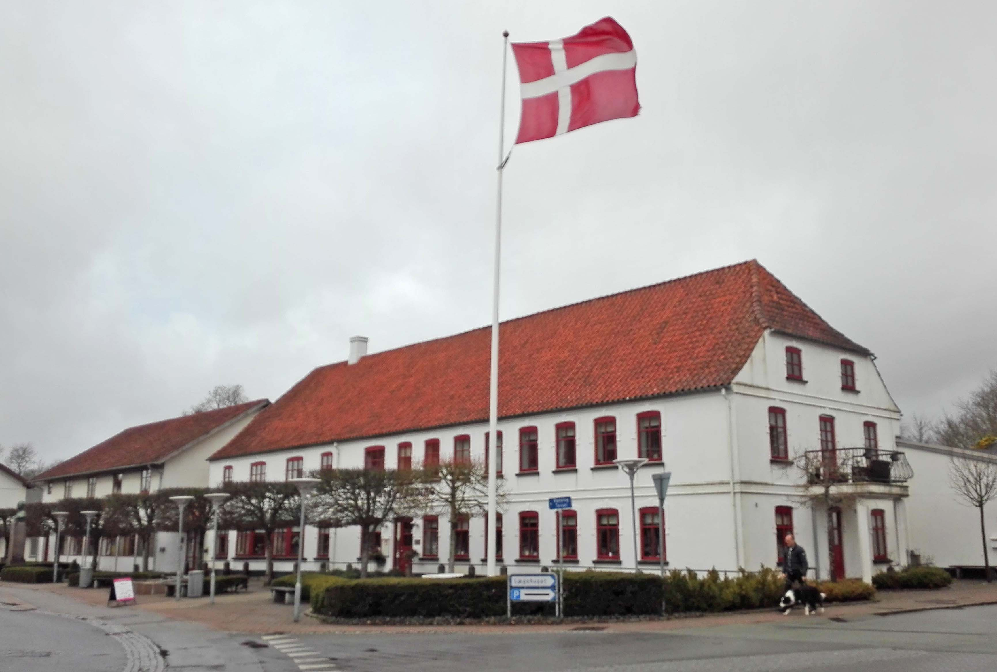 Hotel Rødding